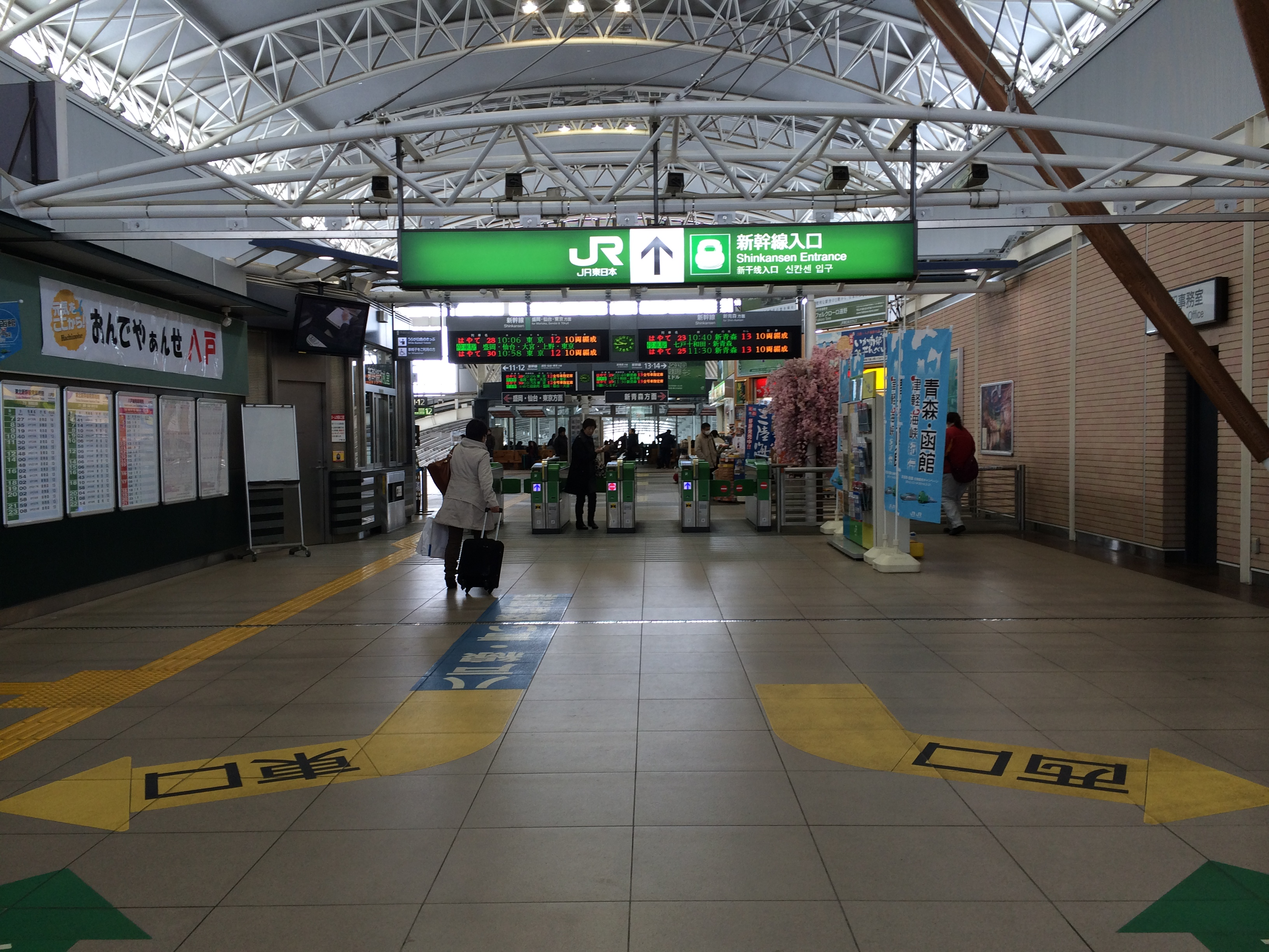 八戸駅新幹線改札口